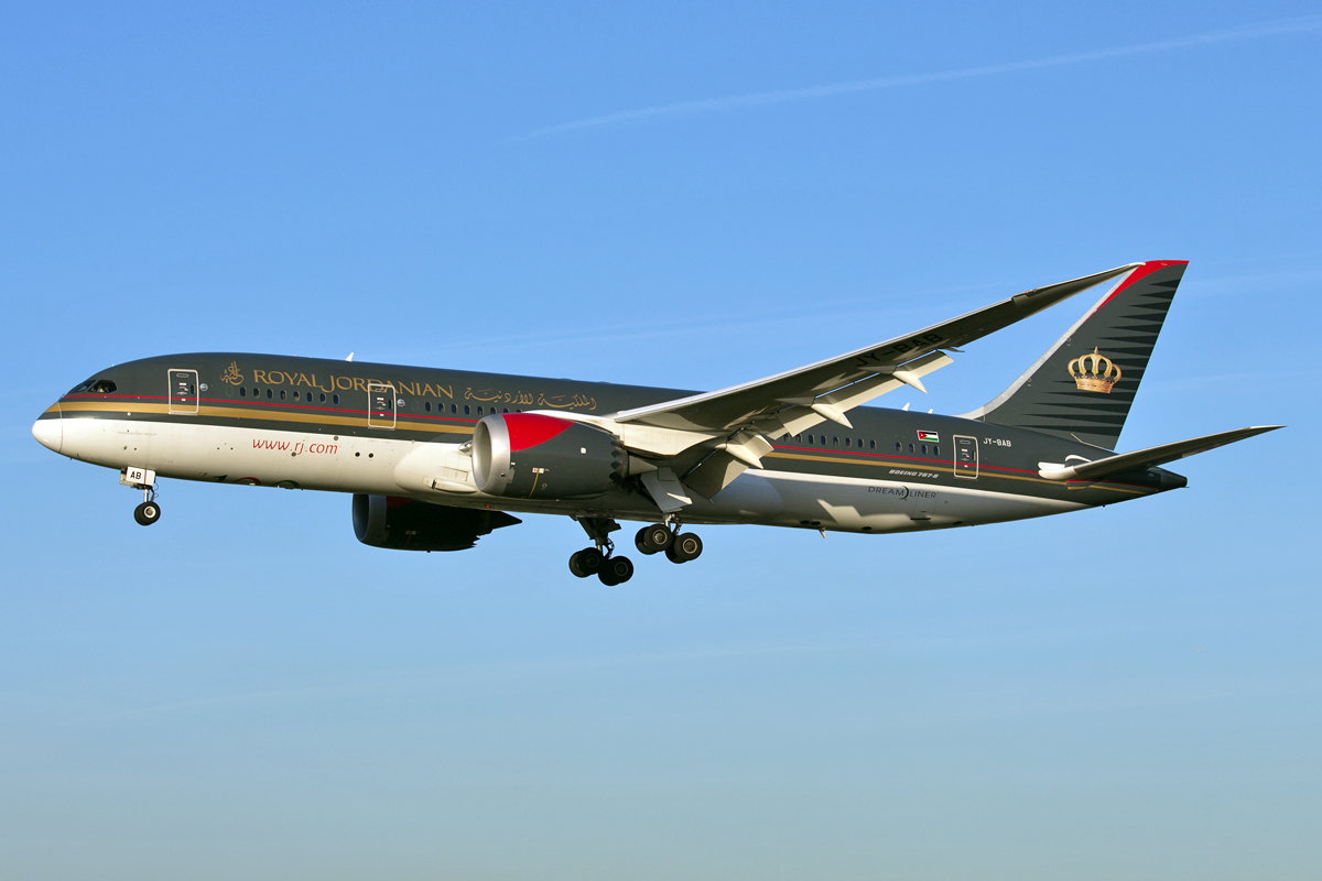 JY-BAB_170105_LHR_5597